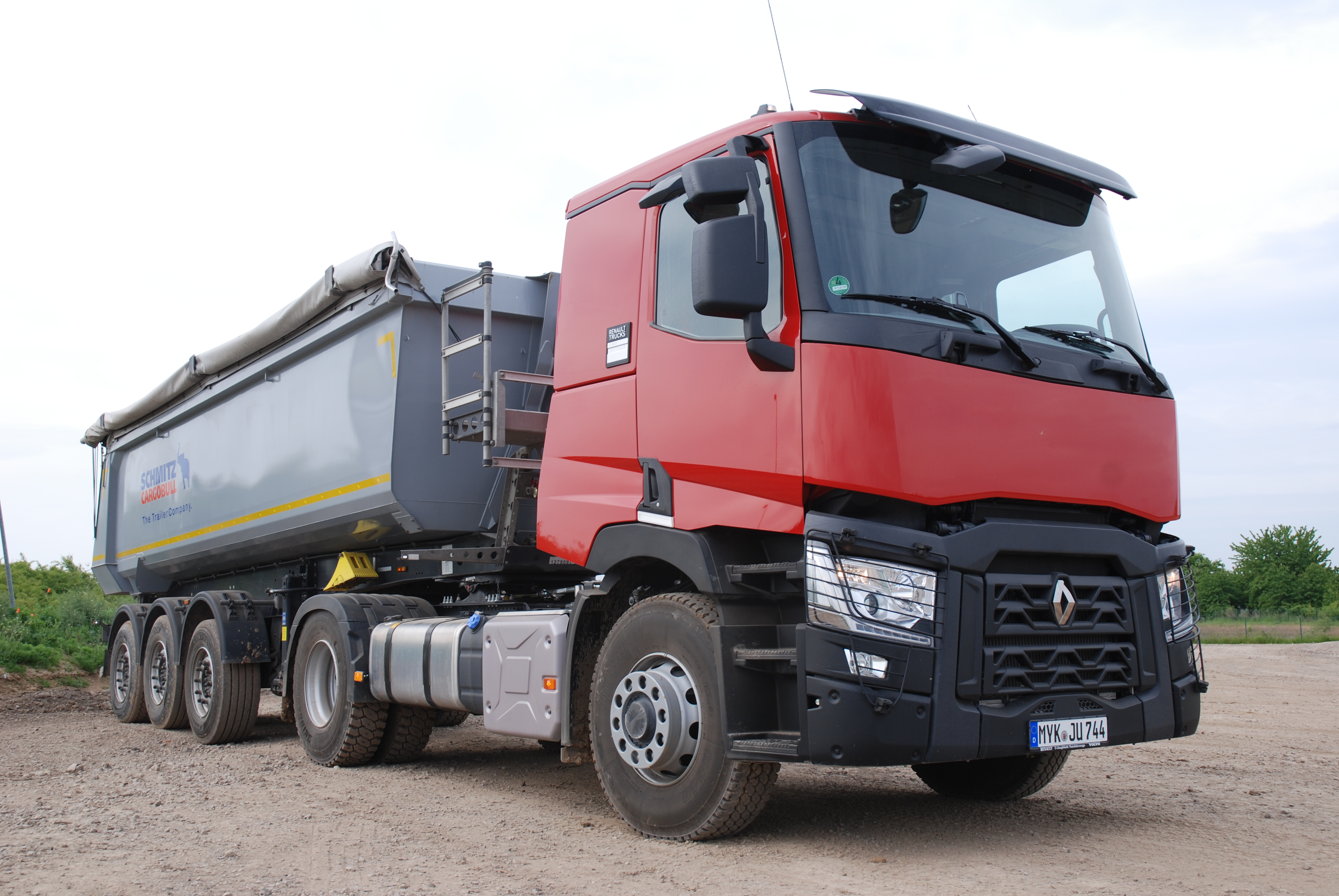 Baureihe C von Renault Trucks